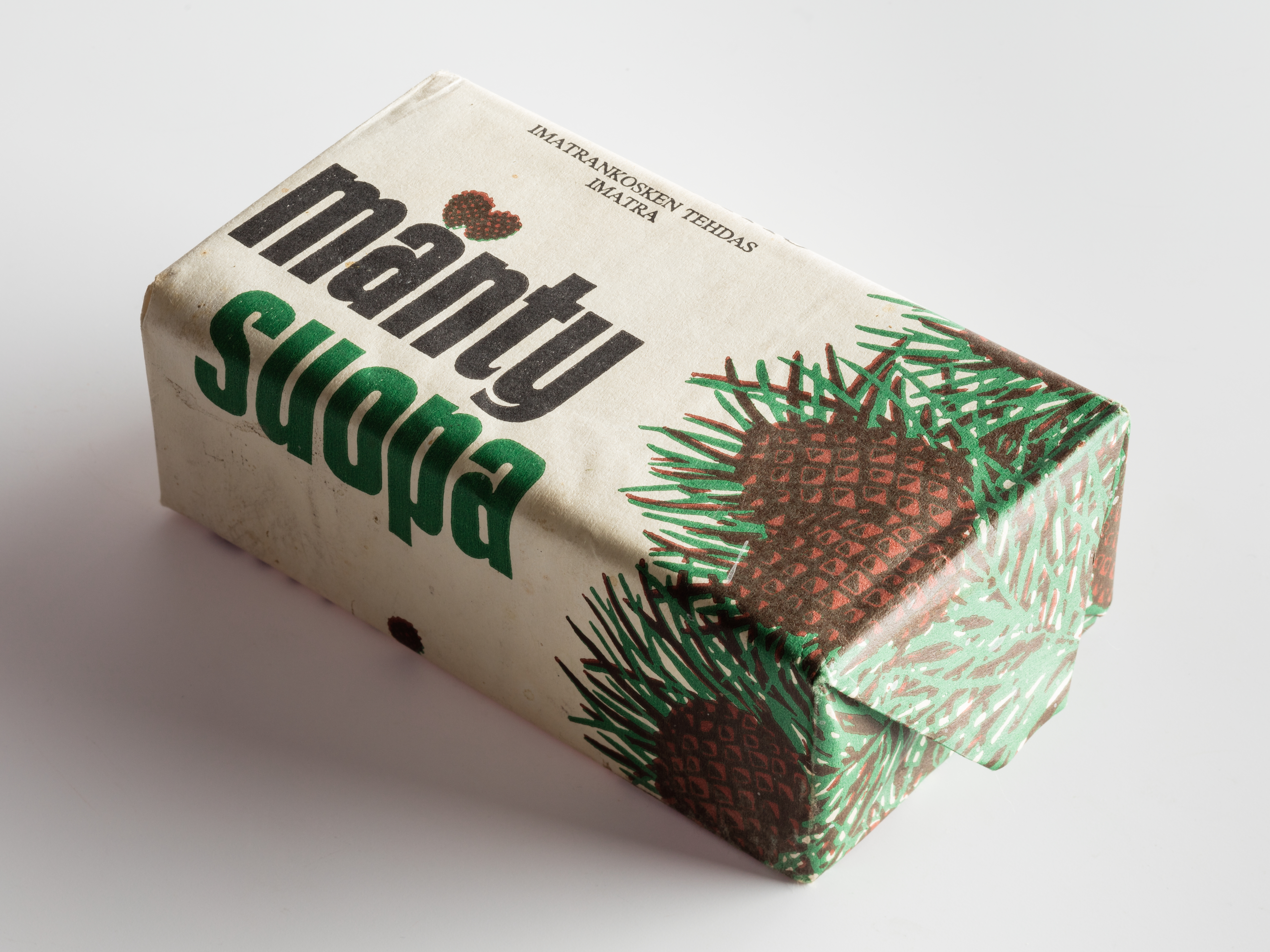 Mäntysuopaa suojapaperissa, Enso-Gutzeit Osakeyhtiö, Imatrankosken tehdas, Imatra